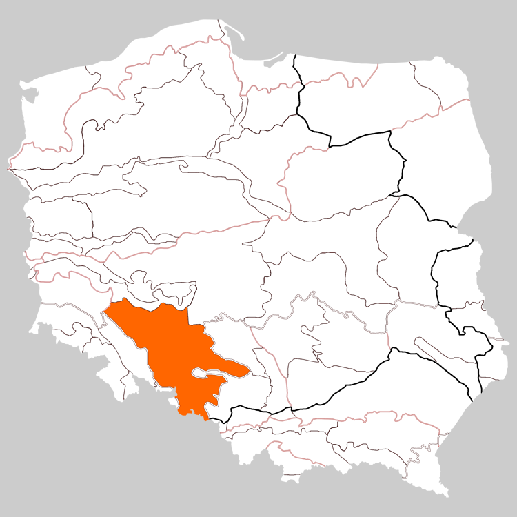 Physico-geographical regionalization of Poland Macroregion 318.5 Silesian Lowland Regionalizacja fizycznogeograficzna Polski Makroregion 318.5 Nizina Śląska